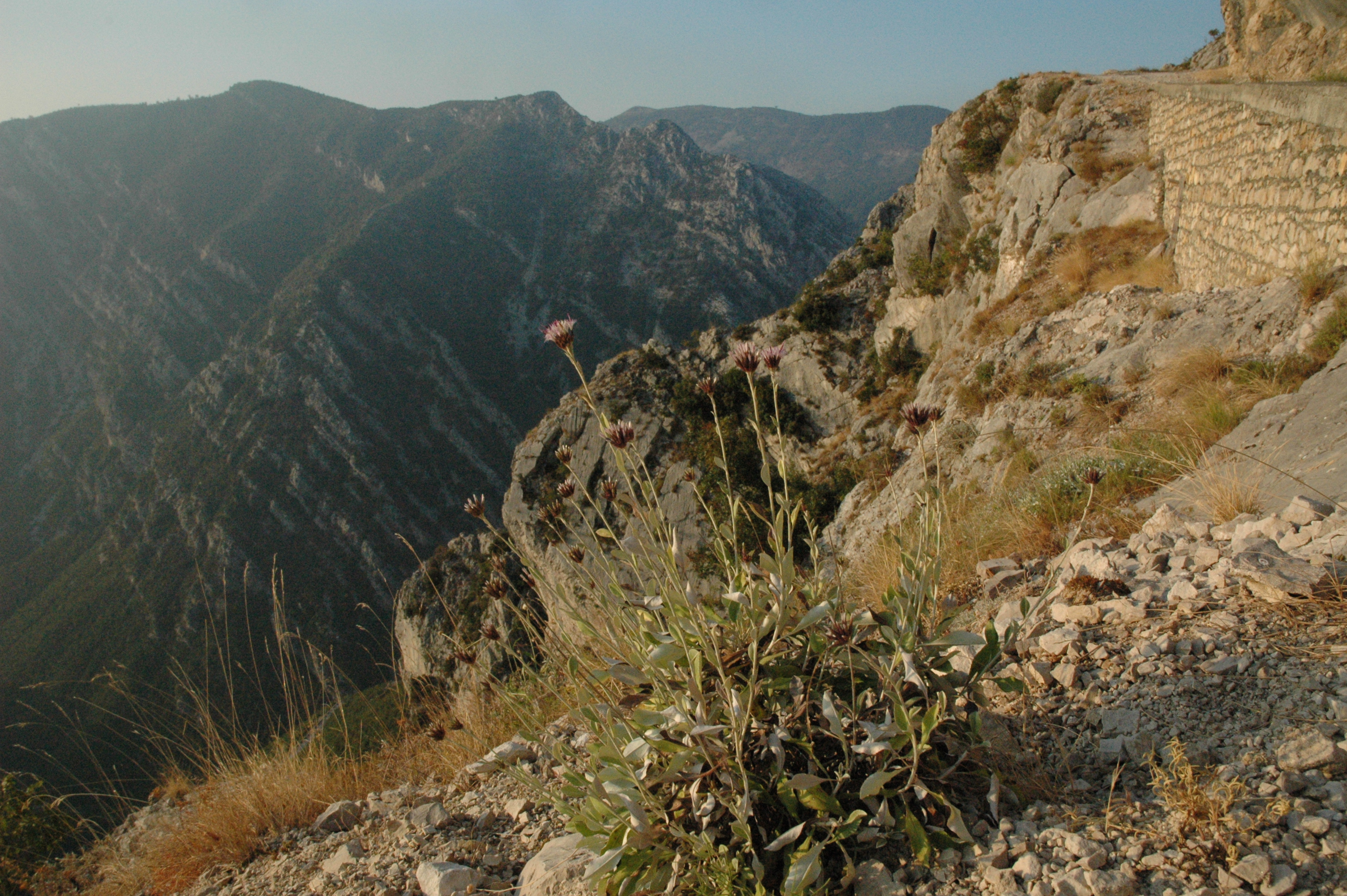 Mountains near Kruja, Albania